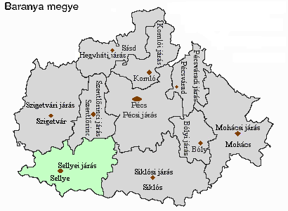 Magyarország, Baranya megye, Sellyei járás